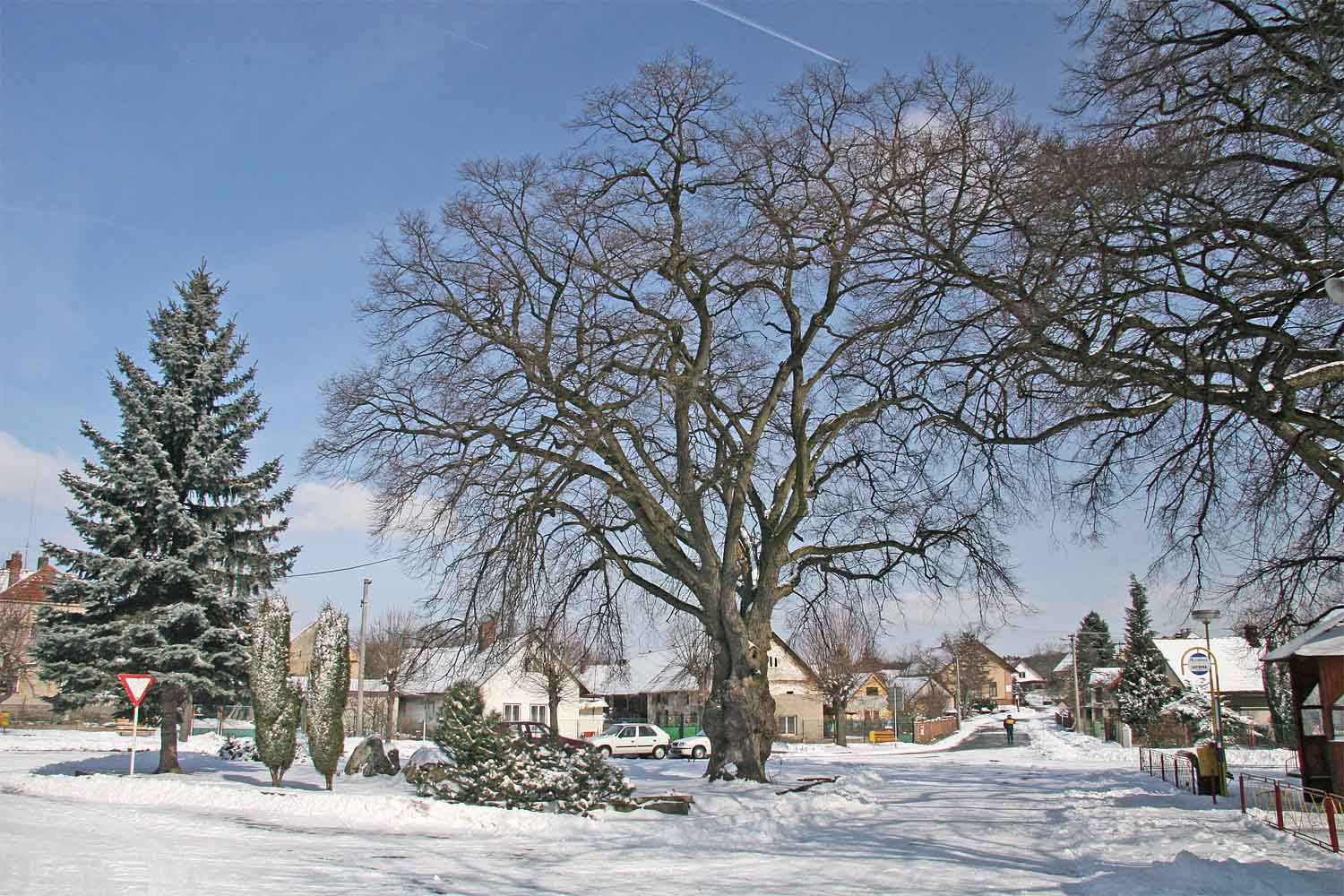 Lípa na návsi v Sovoluskách